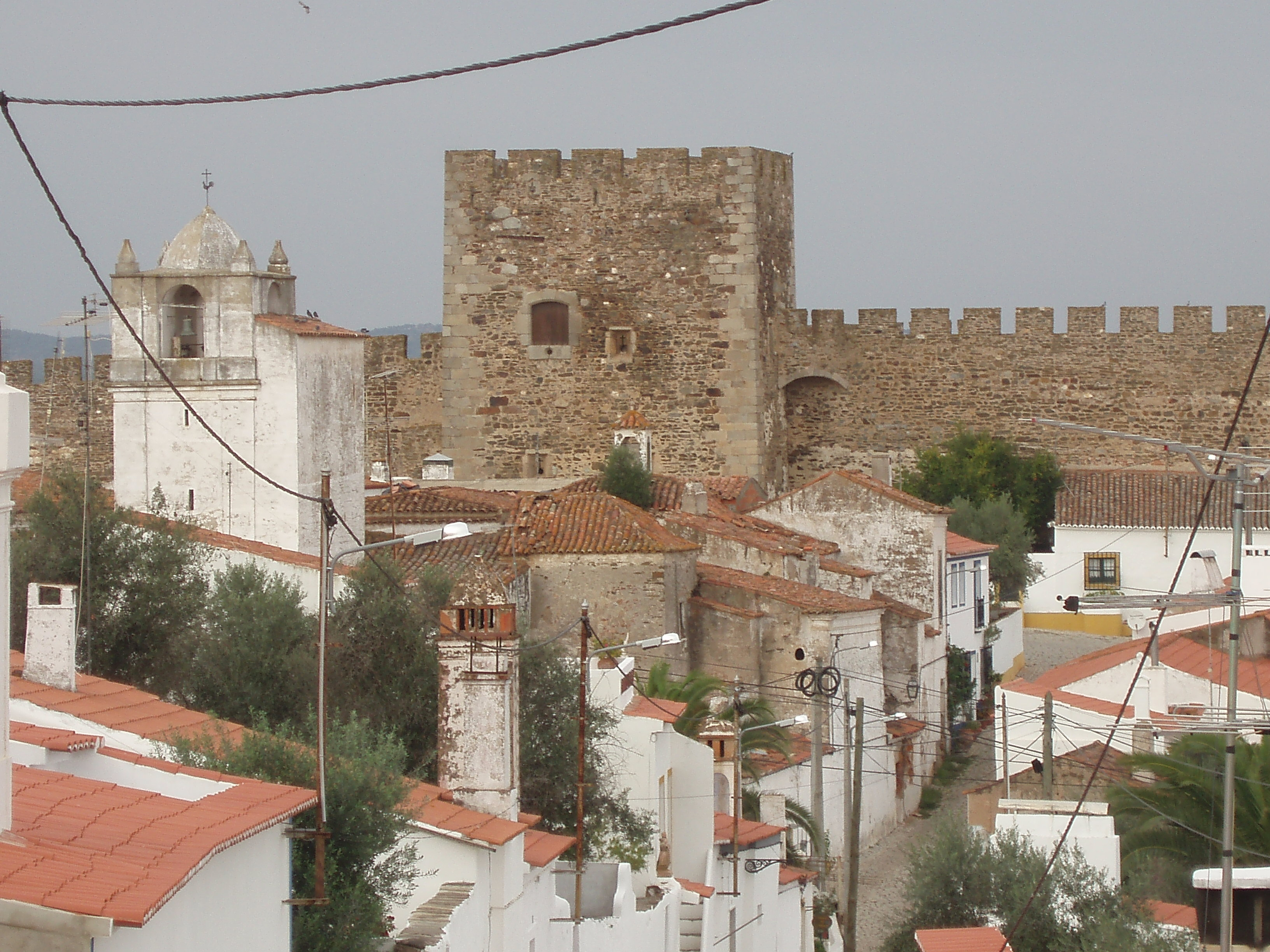 Centro histórico da vila de Terena